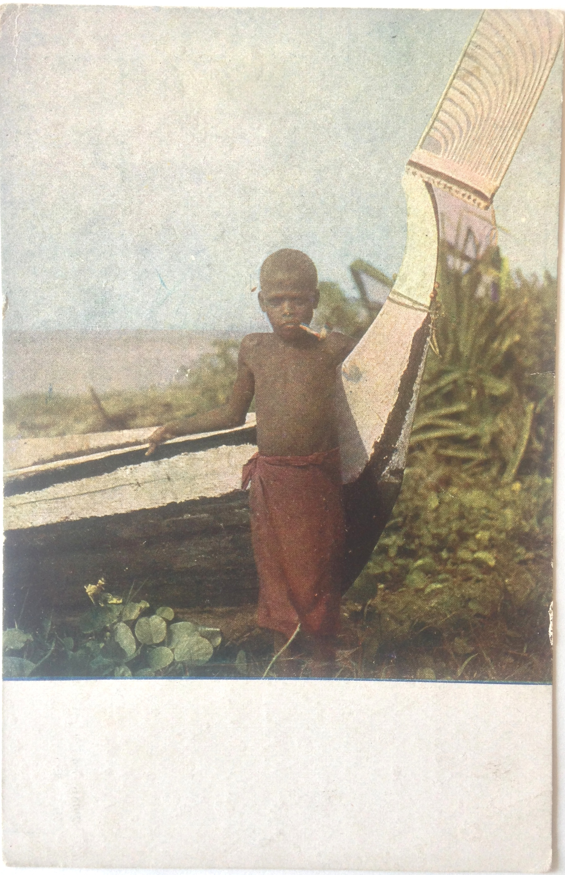 Bruno Marquardt, Bilder aus den deutschen Kolonien. Nr. 9 Knabe aus Neumecklenburg, Kolonial-Kriegerspende. Berlin W.8, Mauersstraße 45/46 Ca. 1915